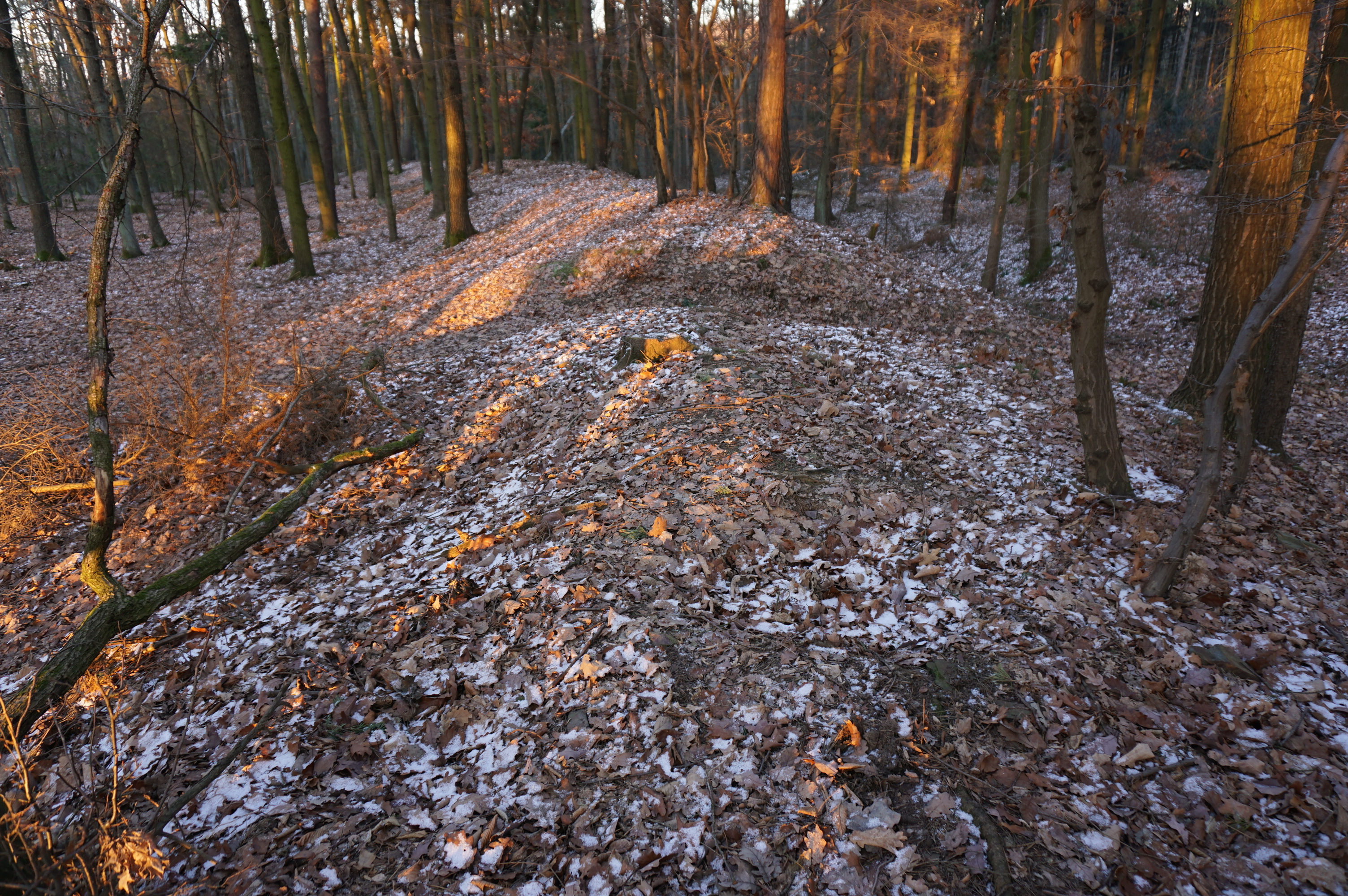 Hradiště Šance, severně nad vsí, Březí (okres Praha-východ).